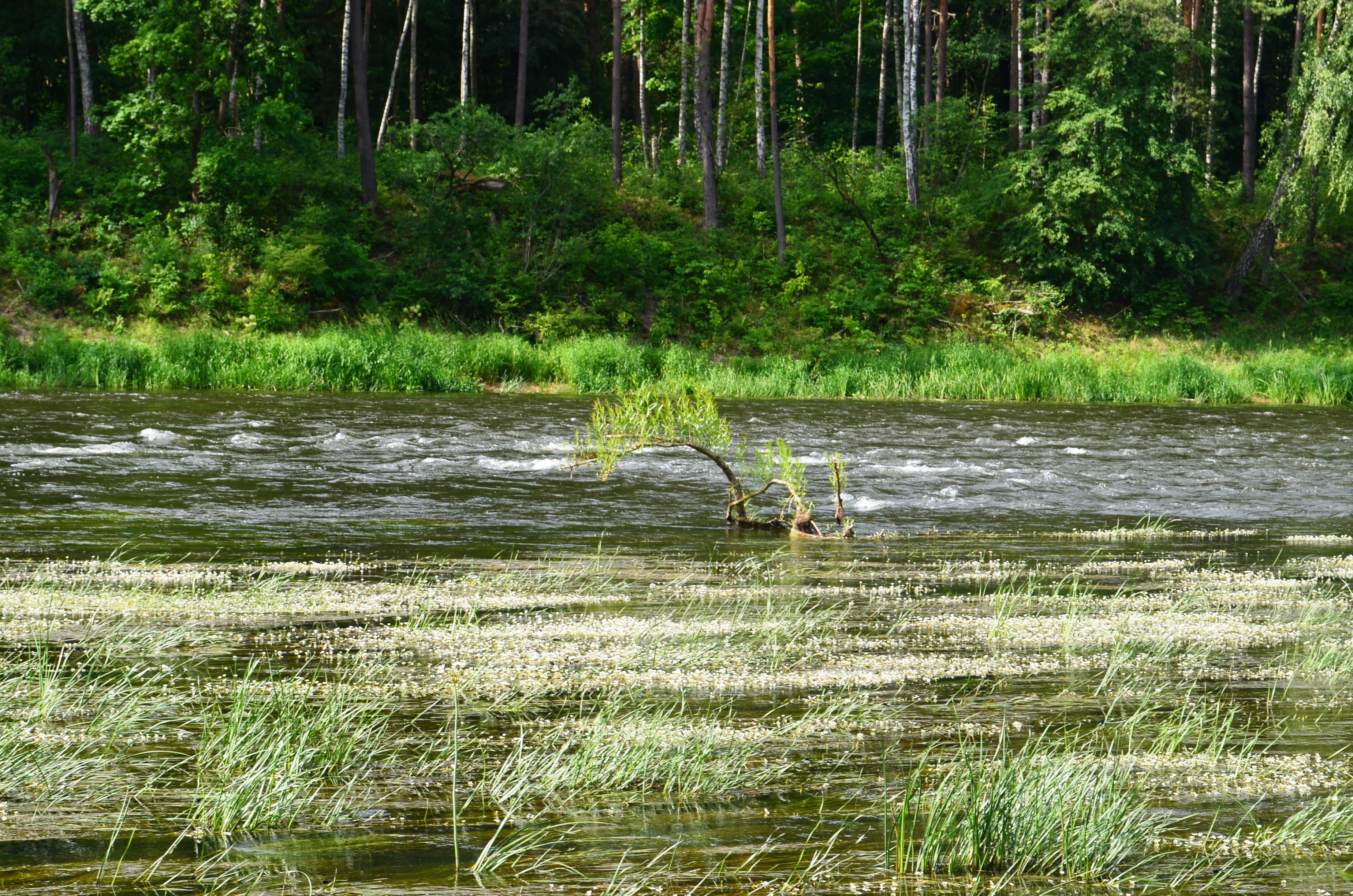 Naujosios Rėvos k. rėva, Neryje; Trakų/Vilniaus raj.